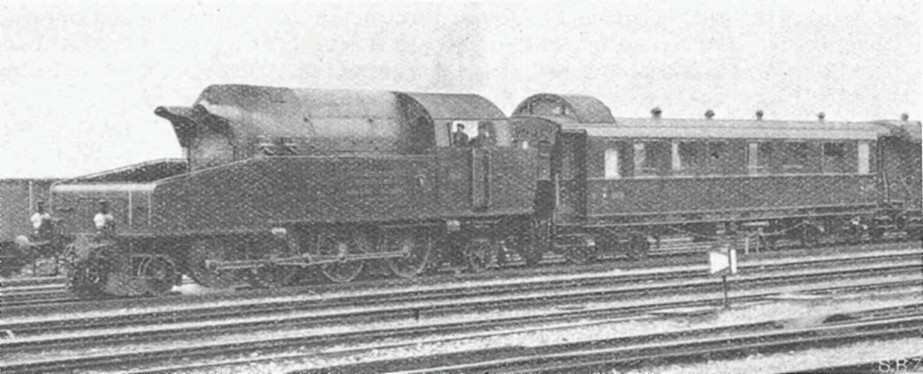 Versuchszug mit der SLM-Hochdrucklokomotive und Dynamometerwagen der SBB